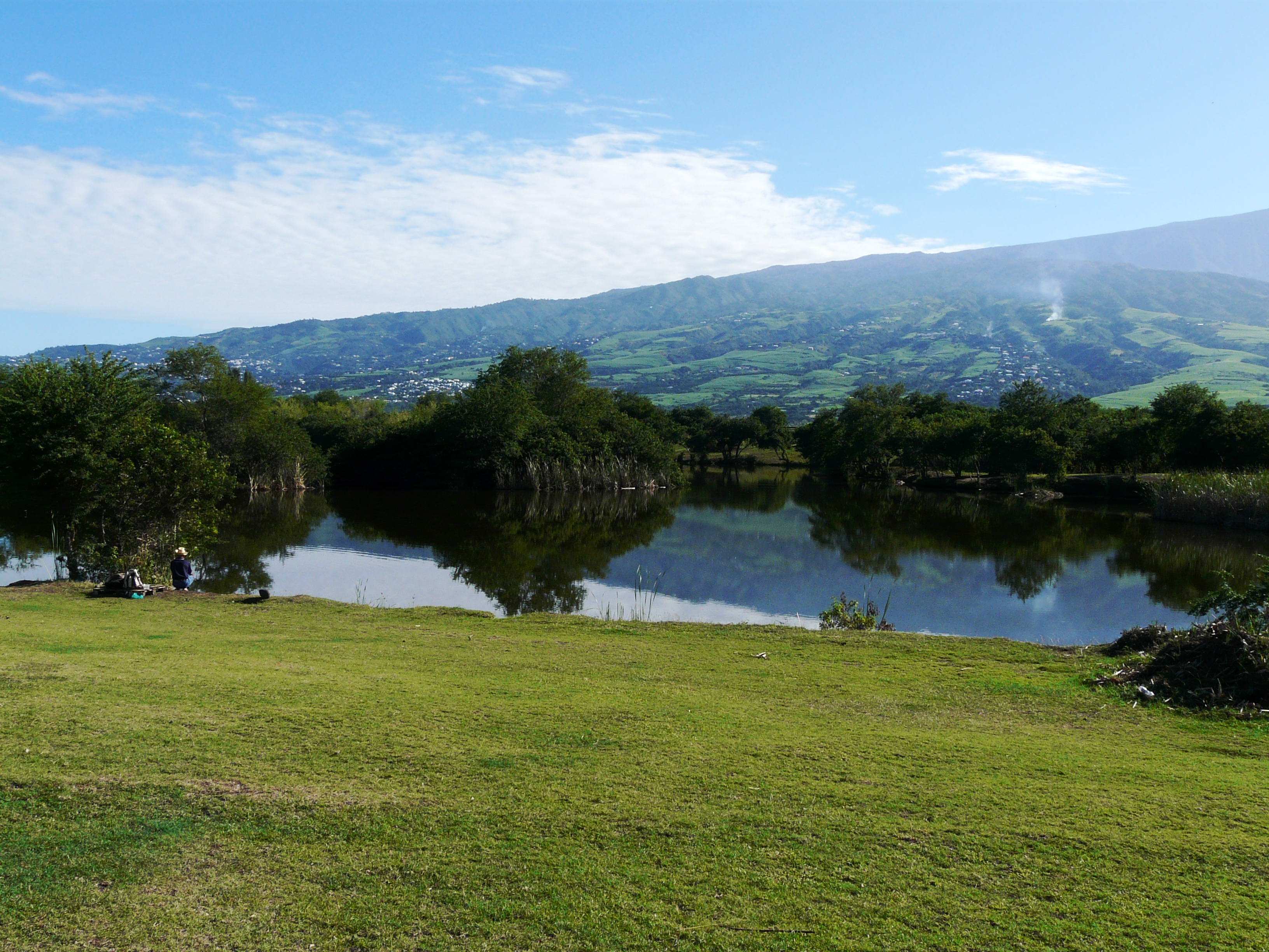 Etang du Gol (juin 2009)